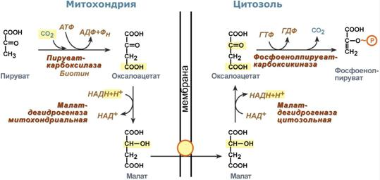 Обход десятой реакции гликолиза